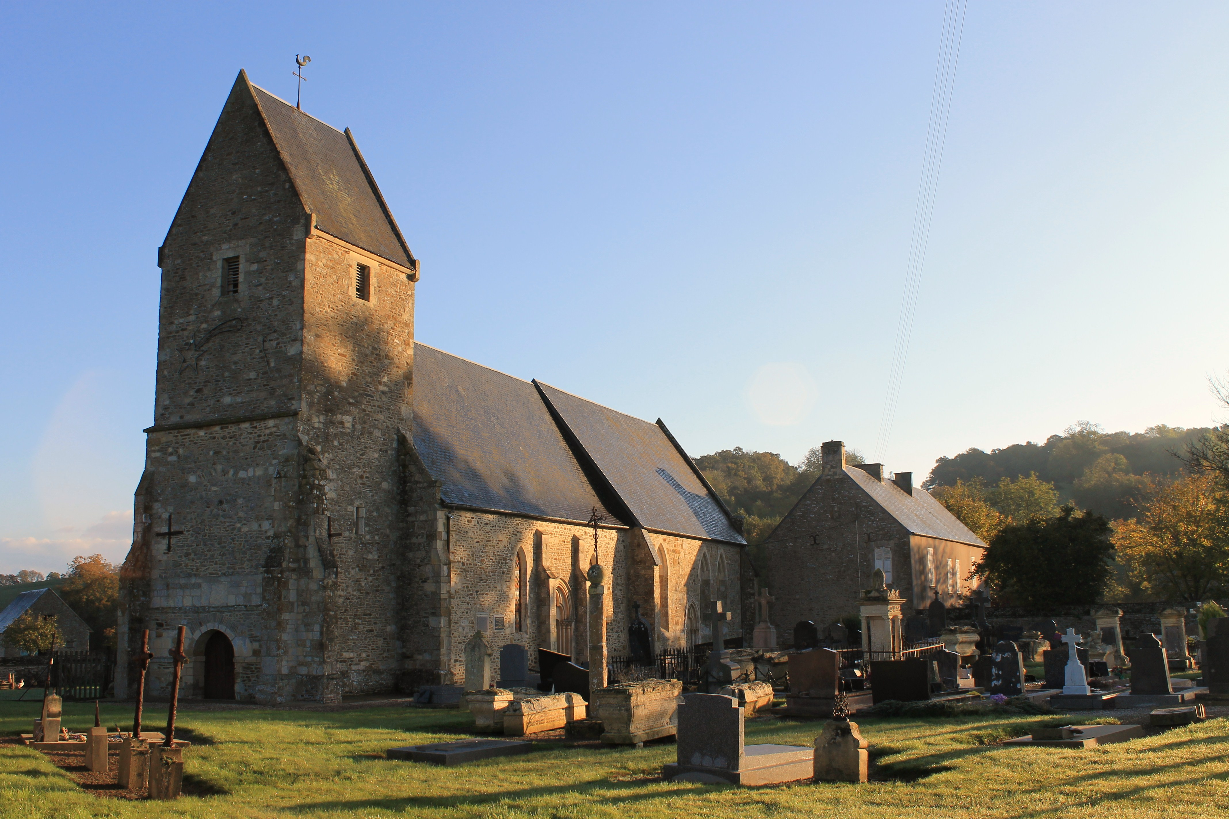 Eglise Saint-Sever à Préaux-Bocage (Calvados)